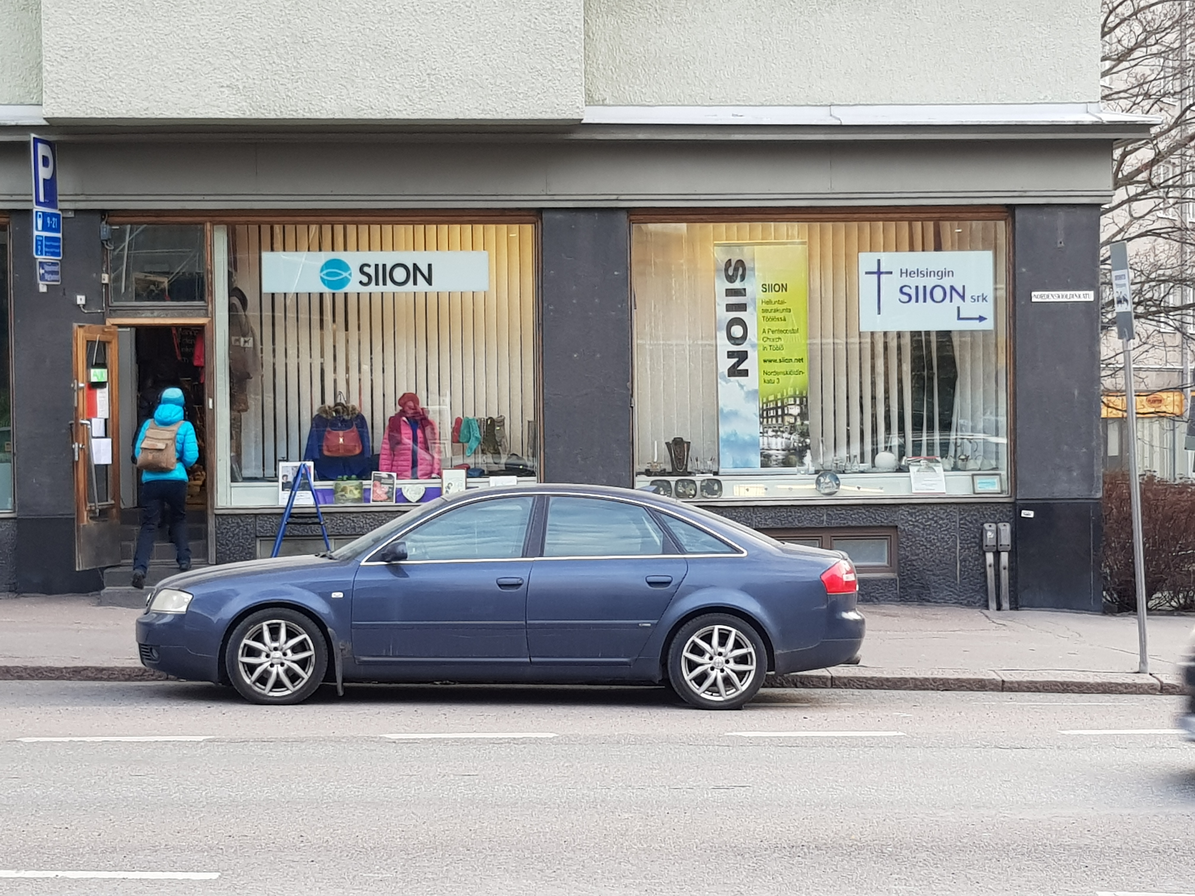 Helsingin Siion-seurakunta, julkisivu Nordenskiöldinkadulla.